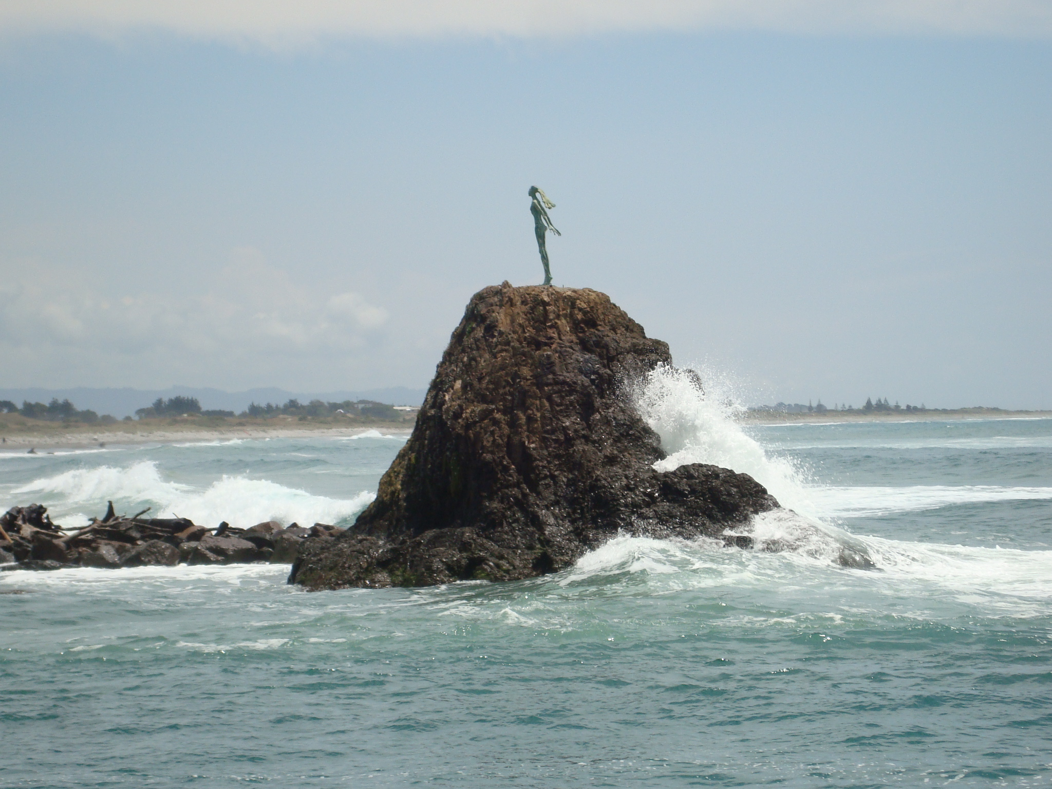 Bronse statuen av Whairaka.